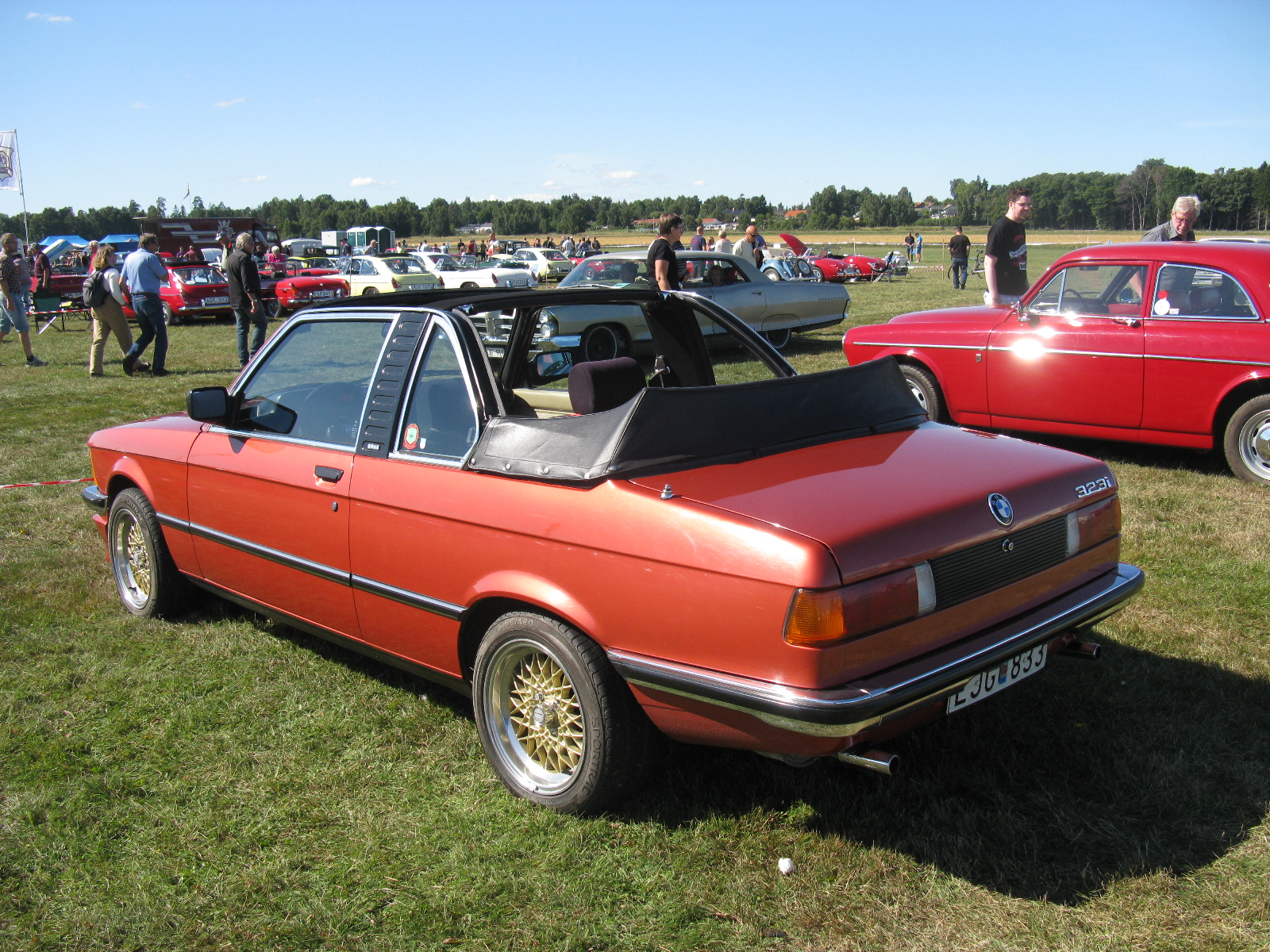 BMW 323i Baur Cabriolet E21